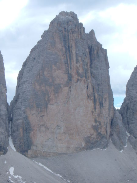 eigen werk. Vrij te gebruiken voor iedereen